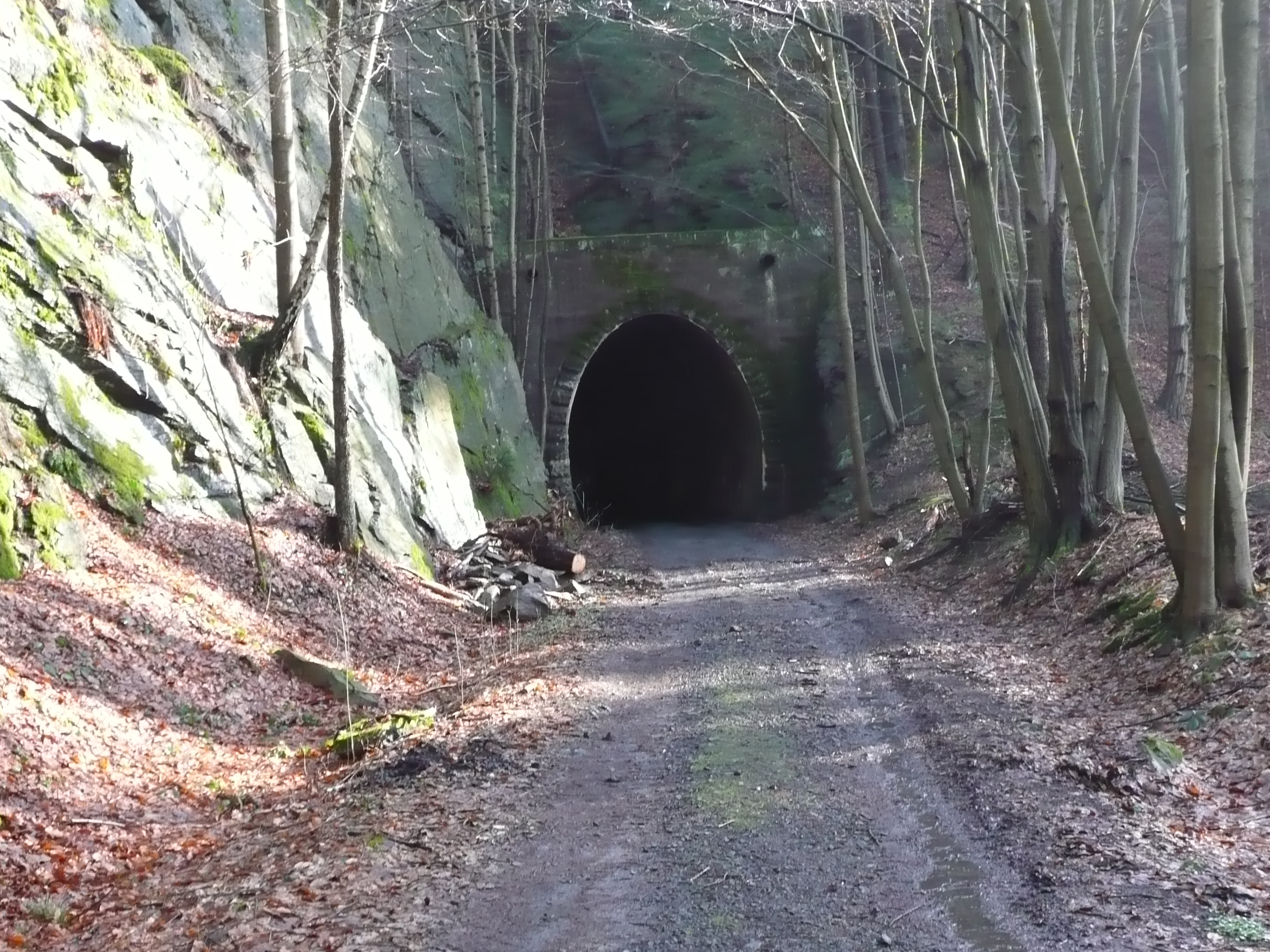 Die Schwarzbachtalbahn besaß bis zum Schluß 2 Tunnel